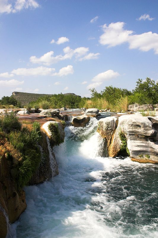 Devil's River - Dolan Falls